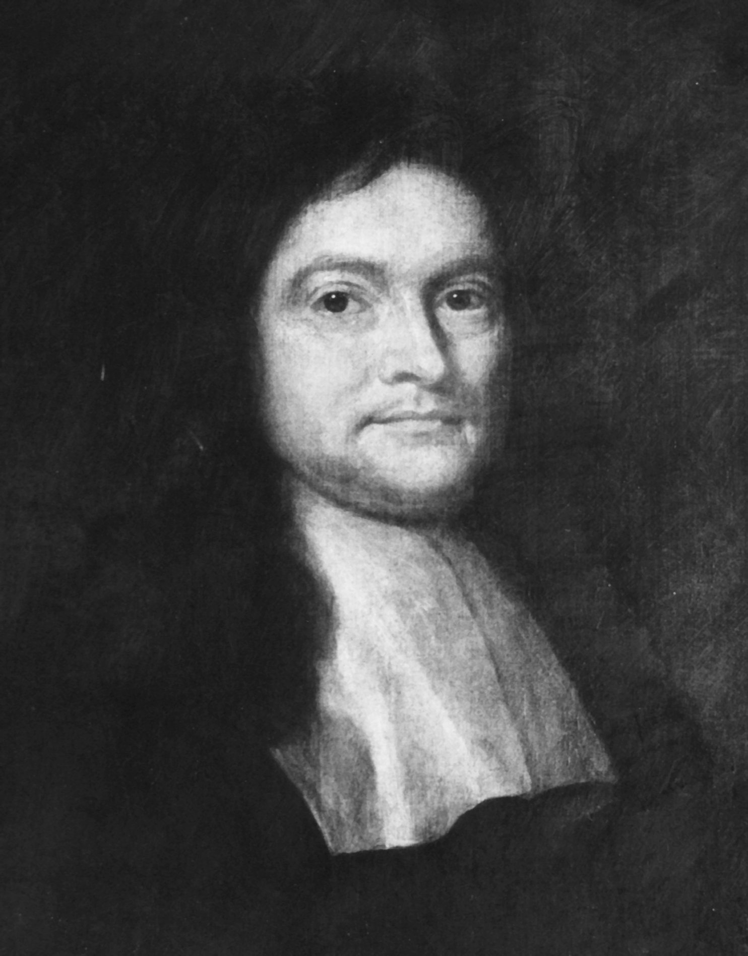 Daniel Whistler (1619–1684)